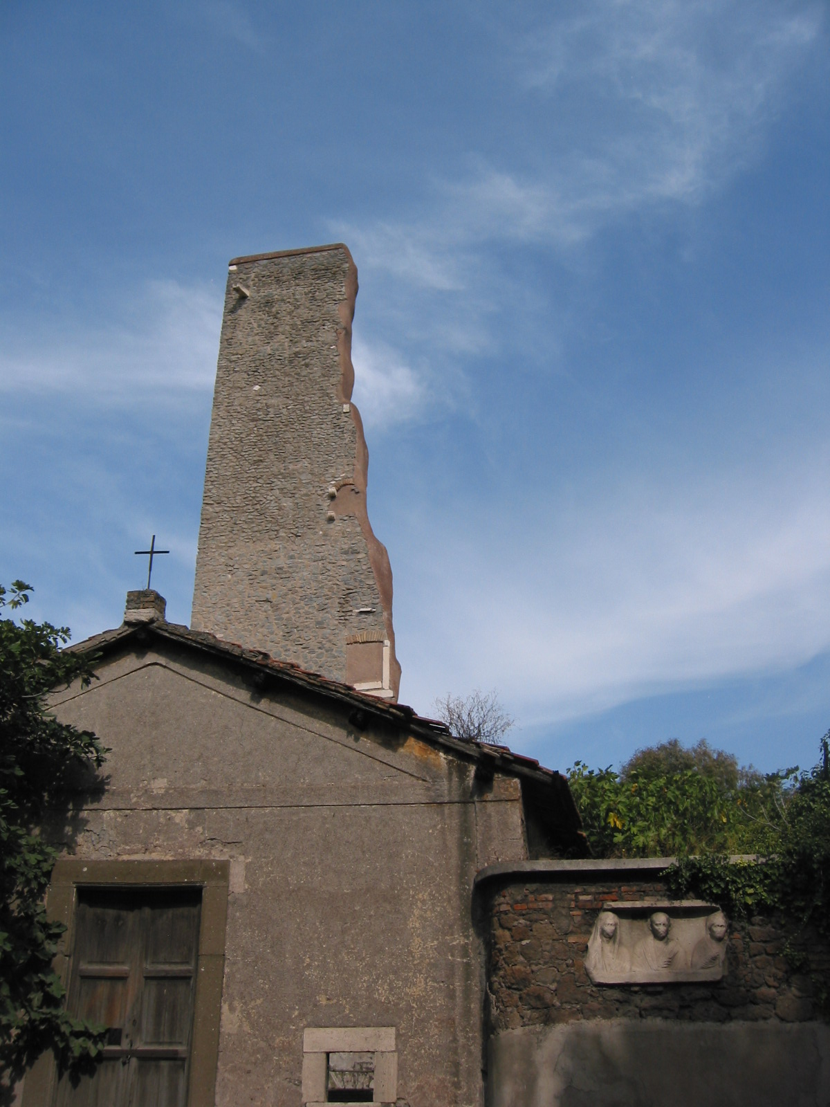 Roma, Tor Tre Teste (via Prenestina ): la mezza torre, la chiesetta e il rilievo sepolcrale con le tre teste